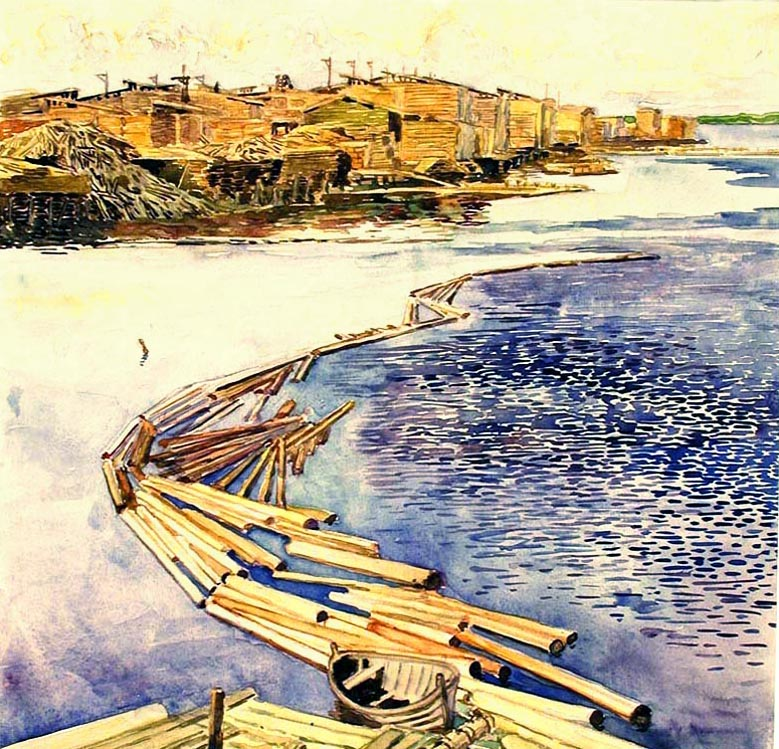 Фогелер Г. Биржа лесопильного завода в Соломенном. 1933 -1934 гг.